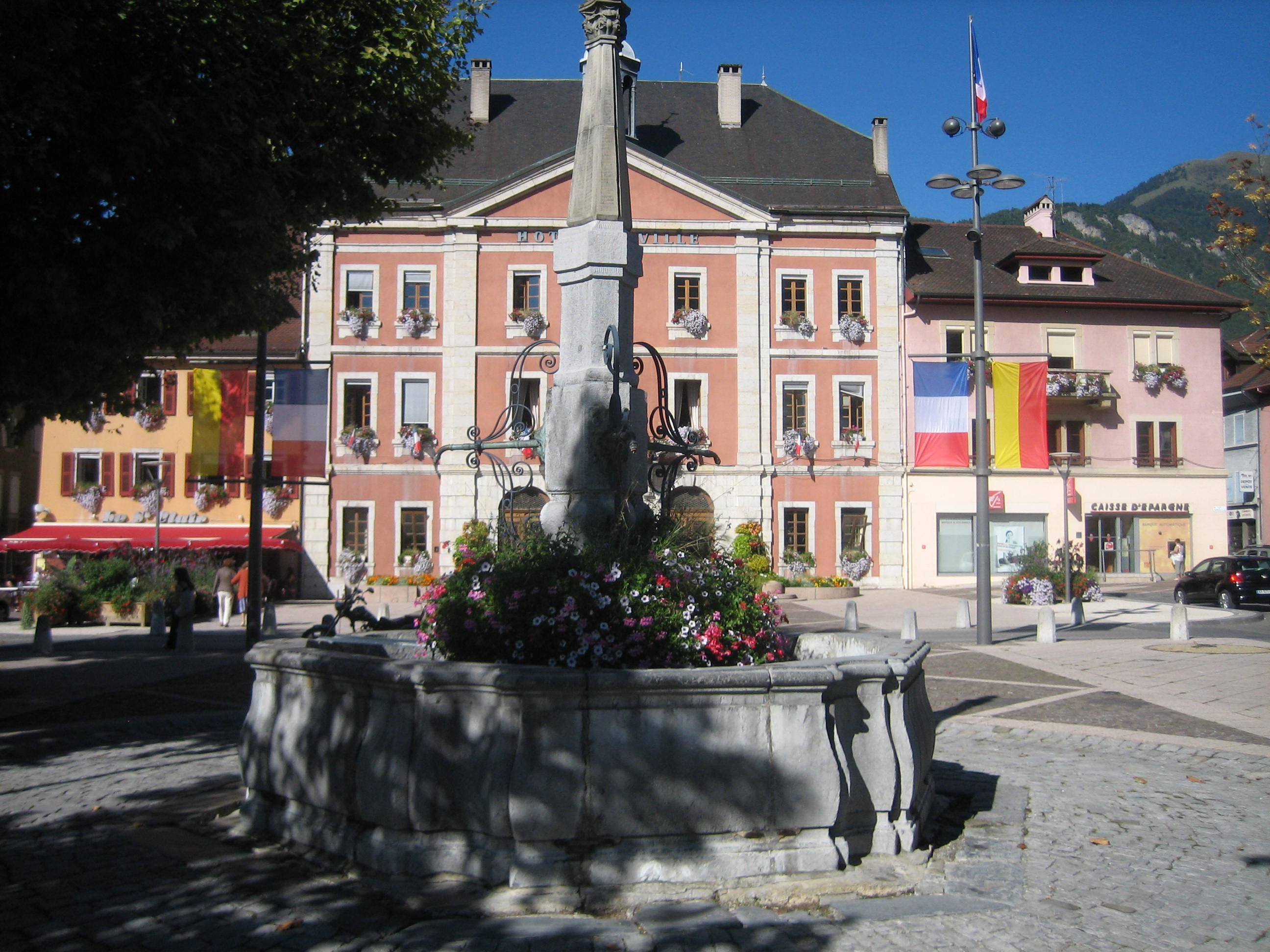 Fontaine de la Place de l'Hôtel de Ville, Bonneville - construite en 1786